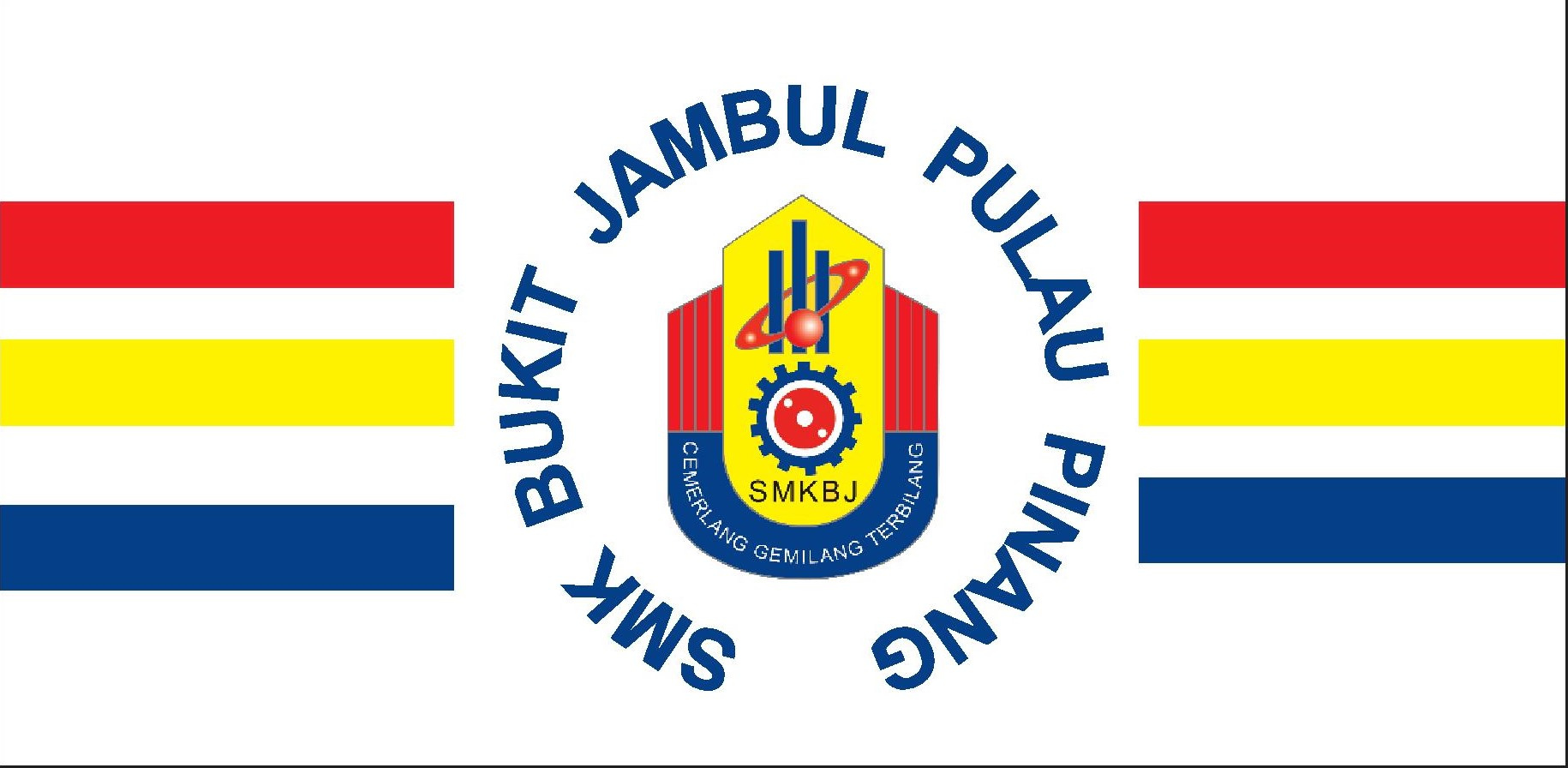 Bendera SMKBJ